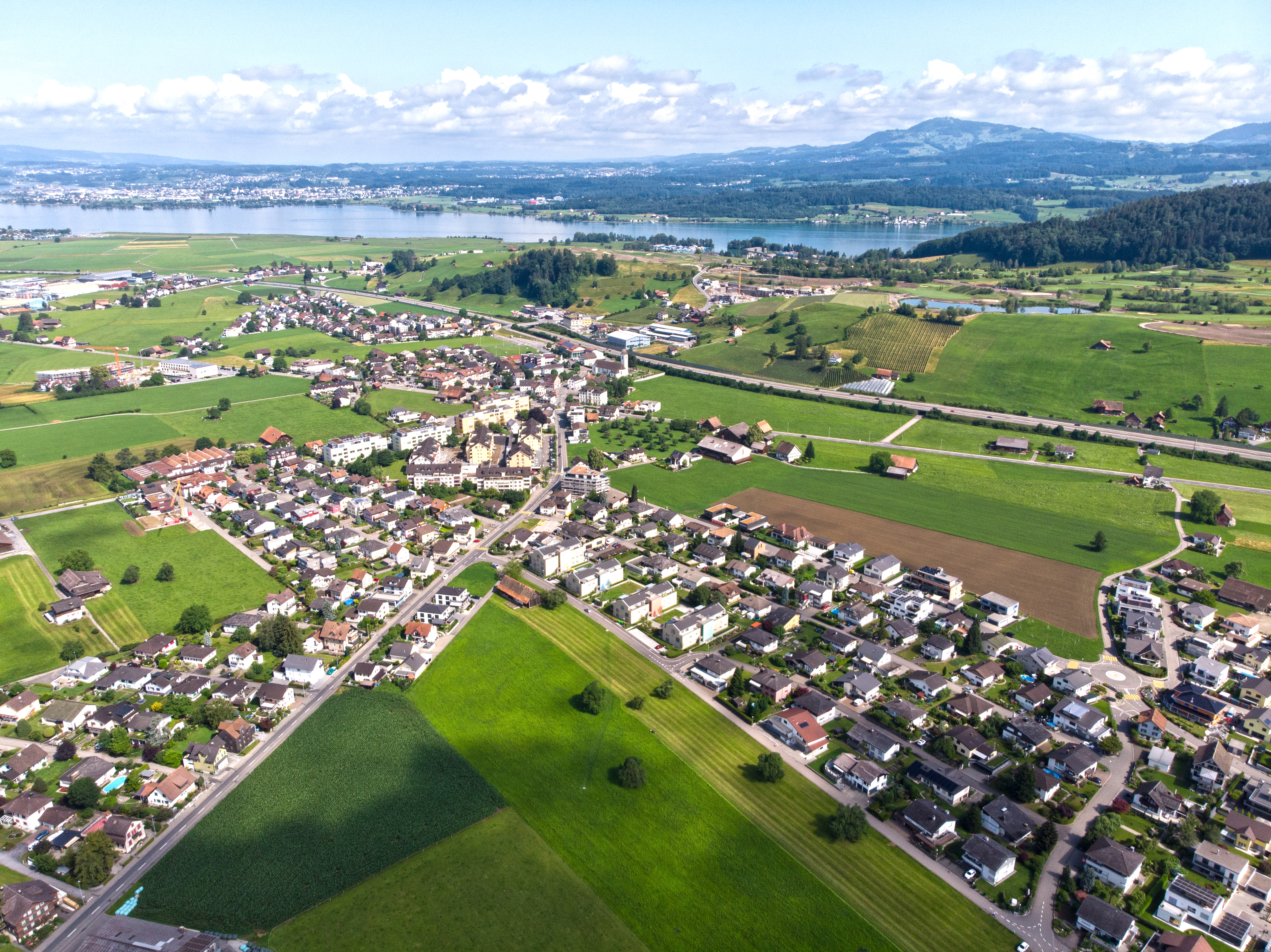 Drohnenaufnahme von Wangen SZ vom Juni 2018.